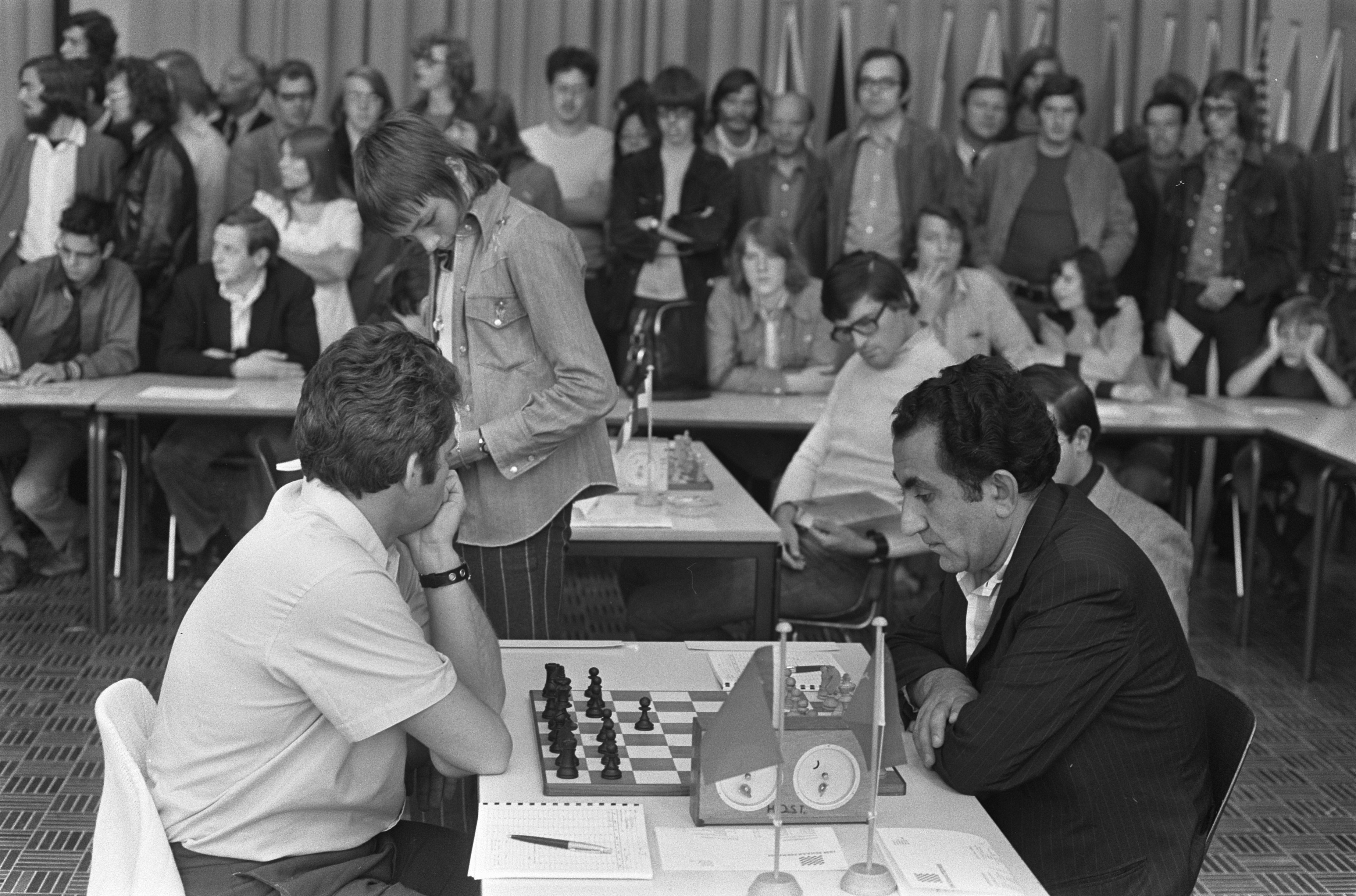 Collectie / Archief : Fotocollectie Anefo Reportage / Serie : [ onbekend ] Beschrijving : IBM-schaaktoernooi, veel publiek bij partij Spasski (links) tegen Petrosjan Datum : 19 juli 1973 Locatie : Amsterdam, Noord-Holland Trefwoorden : schaken, sport Persoonsnaam : Petrosian, Tigran, Spassky, Boris Fotograaf : Punt, […] / Anefo Auteursrechthebbende : Nationaal Archief Materiaalsoort : Negatief (zwart/wit) Nummer archiefinventaris : bekijk toegang 2.24.01.05 Bestanddeelnummer : 926-5585